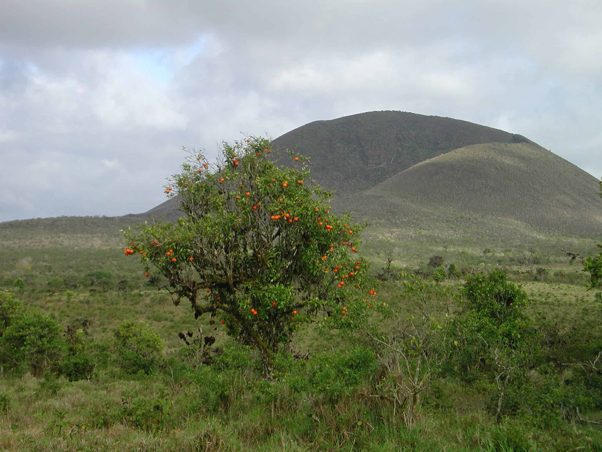 Photo du Cerro Pajas (volcan inactif) sur l'île de Floreana